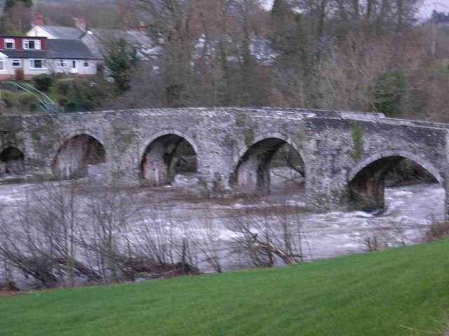 Llangynidr Bridge, in winter